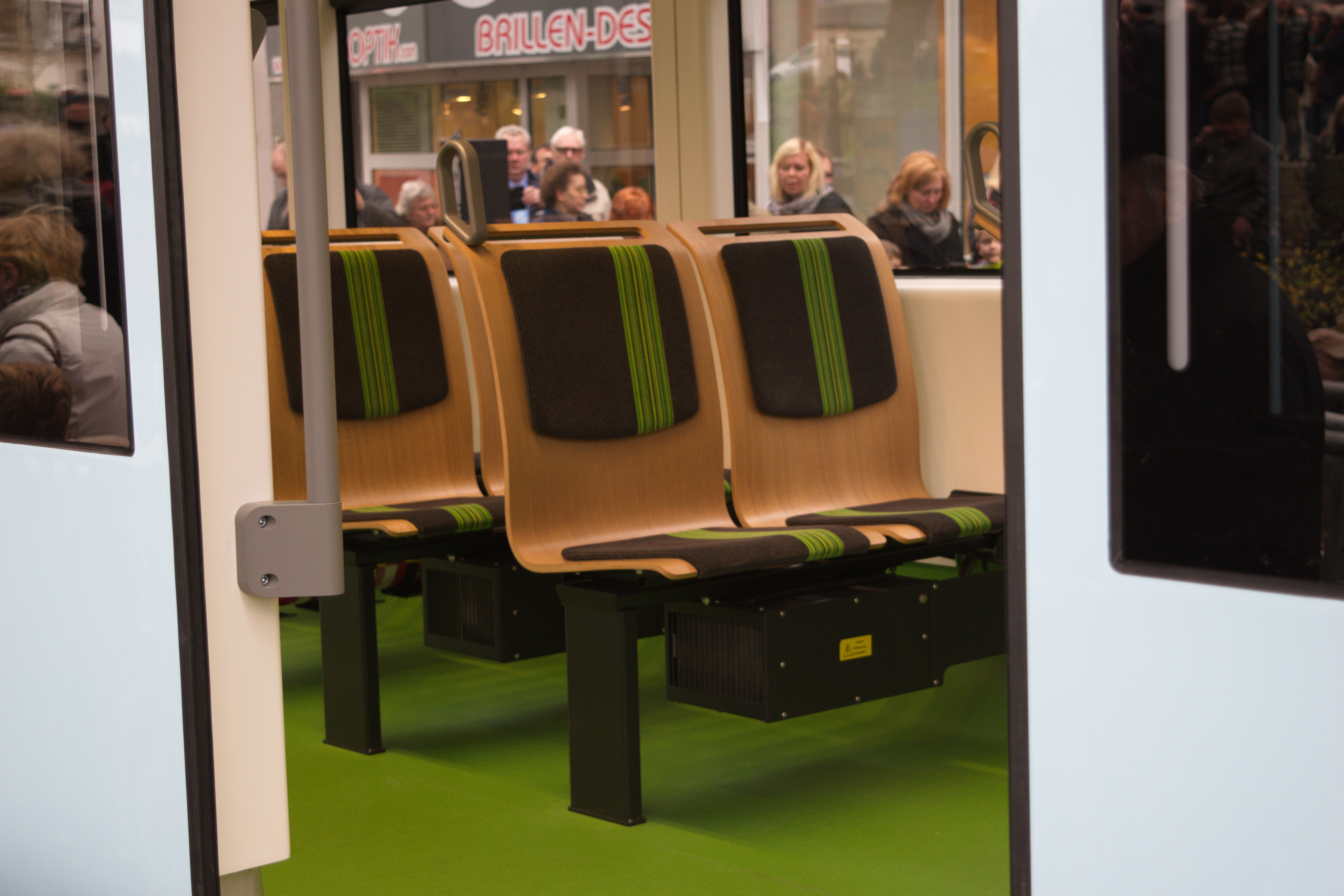 Anlieferung des erstenn GTW 2014 am 14. November 2015 in Wuppertal. Mit einem kleinen Volksfest zu Begrüßung und Einweihung des Schwebebahnparks im Stationsgarten Vohwinkel.